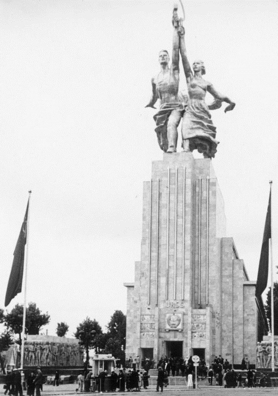 Weltausstellung 1937 in Paris, sowjetischer Pavillon mit Statue "Kolchosbäuerin und Arbeiter" von W. Muchina Information added by Wikimedia users.See Image:La Tour Eiffel en 1937 contrast.png and ParisExpo1.jpg for other views of the building.